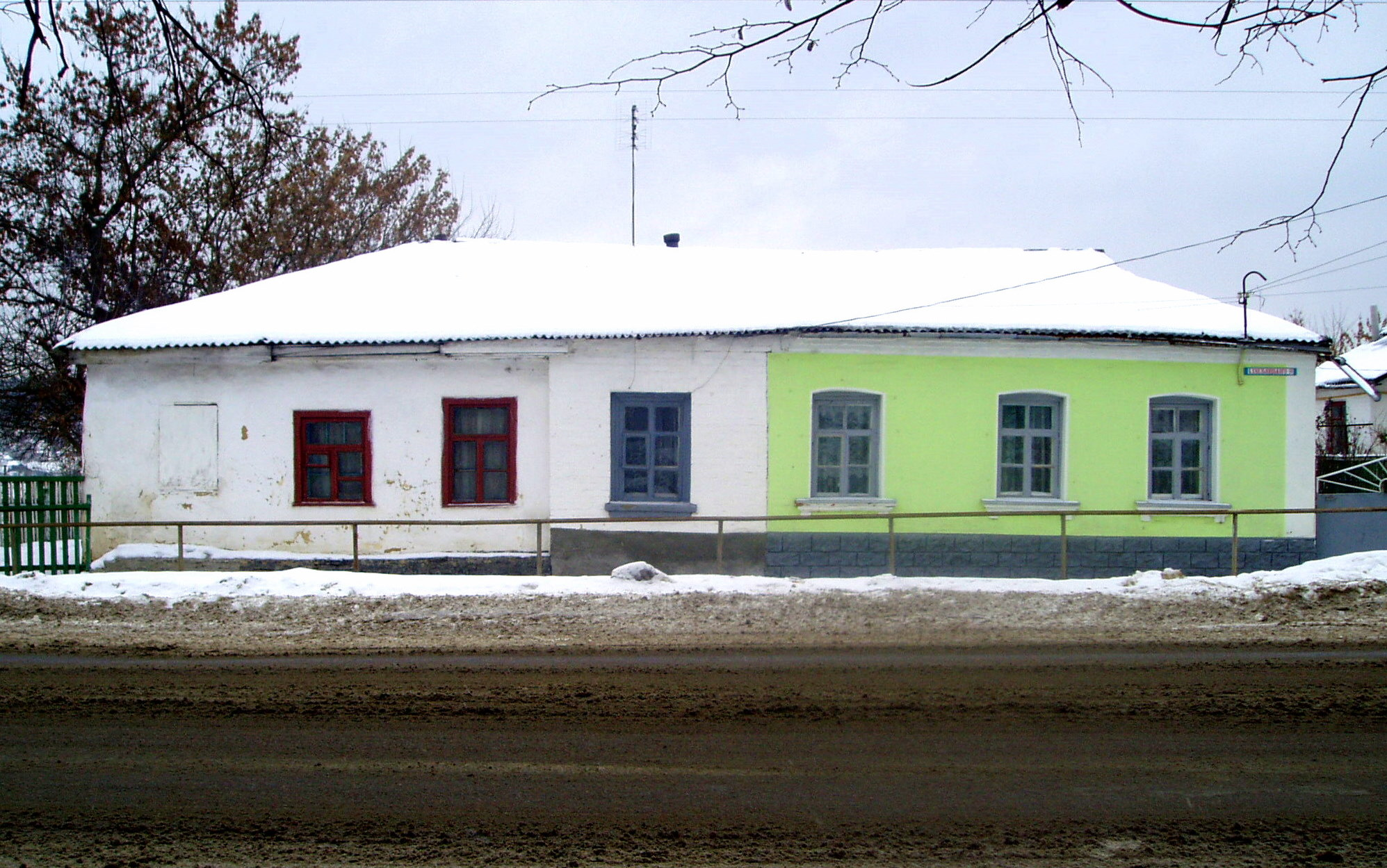 Тараща, одна з синагог: одна з синагог